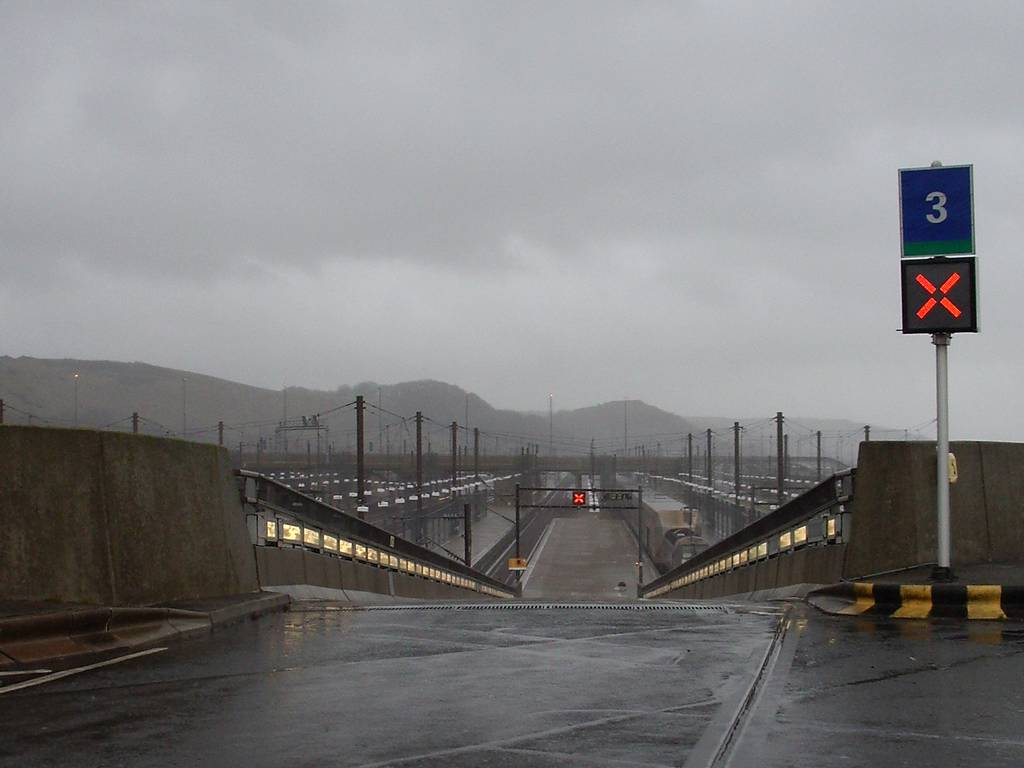 Rampe d'accès aux trains à Folkestone